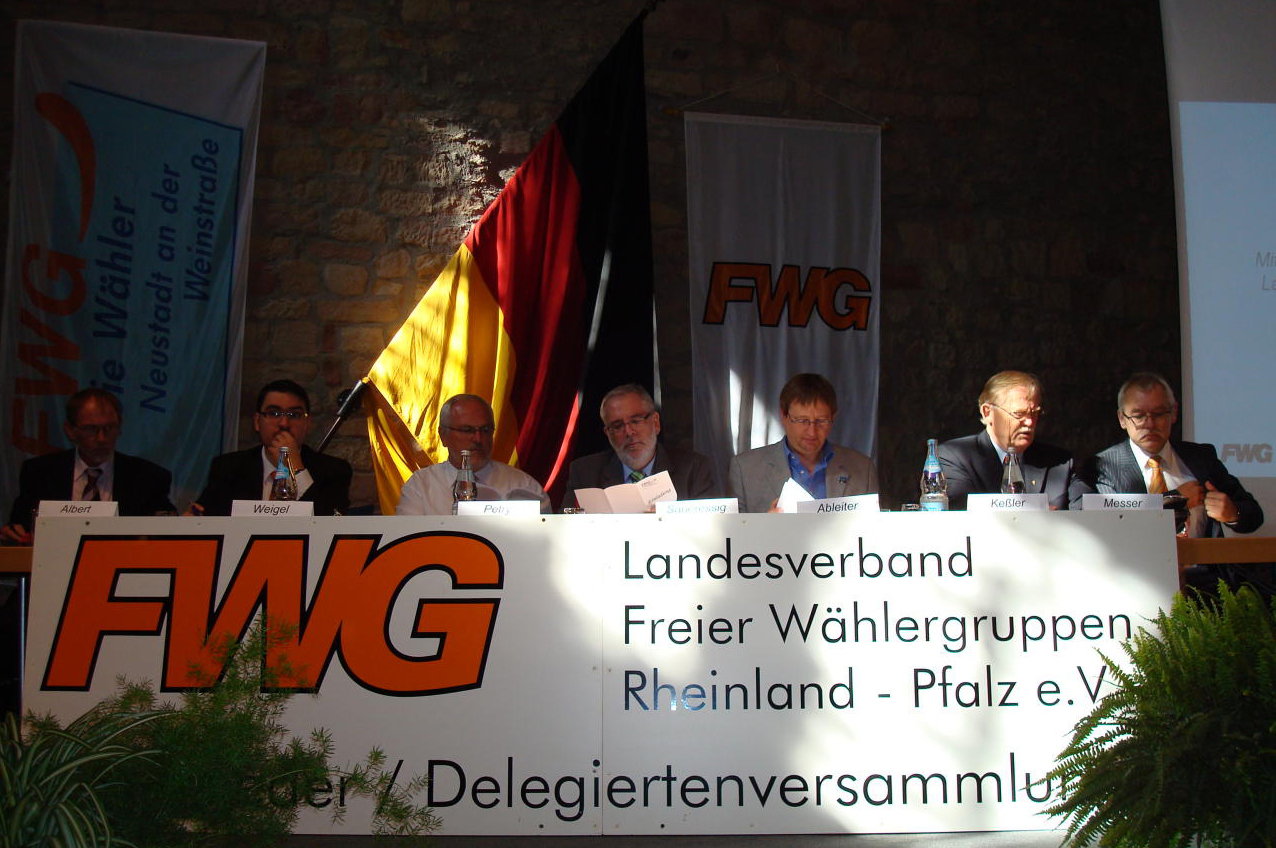 Delegiertenversammlung der FWG Rheinland-Pfalz 15.9.2007, Hambacher Schloss, von Links: Joachim Albert, Marc Weigel, Manfred Petry, Heinz Saueressig, Claus Ableiter, Werner Keßler, Klaus Messer